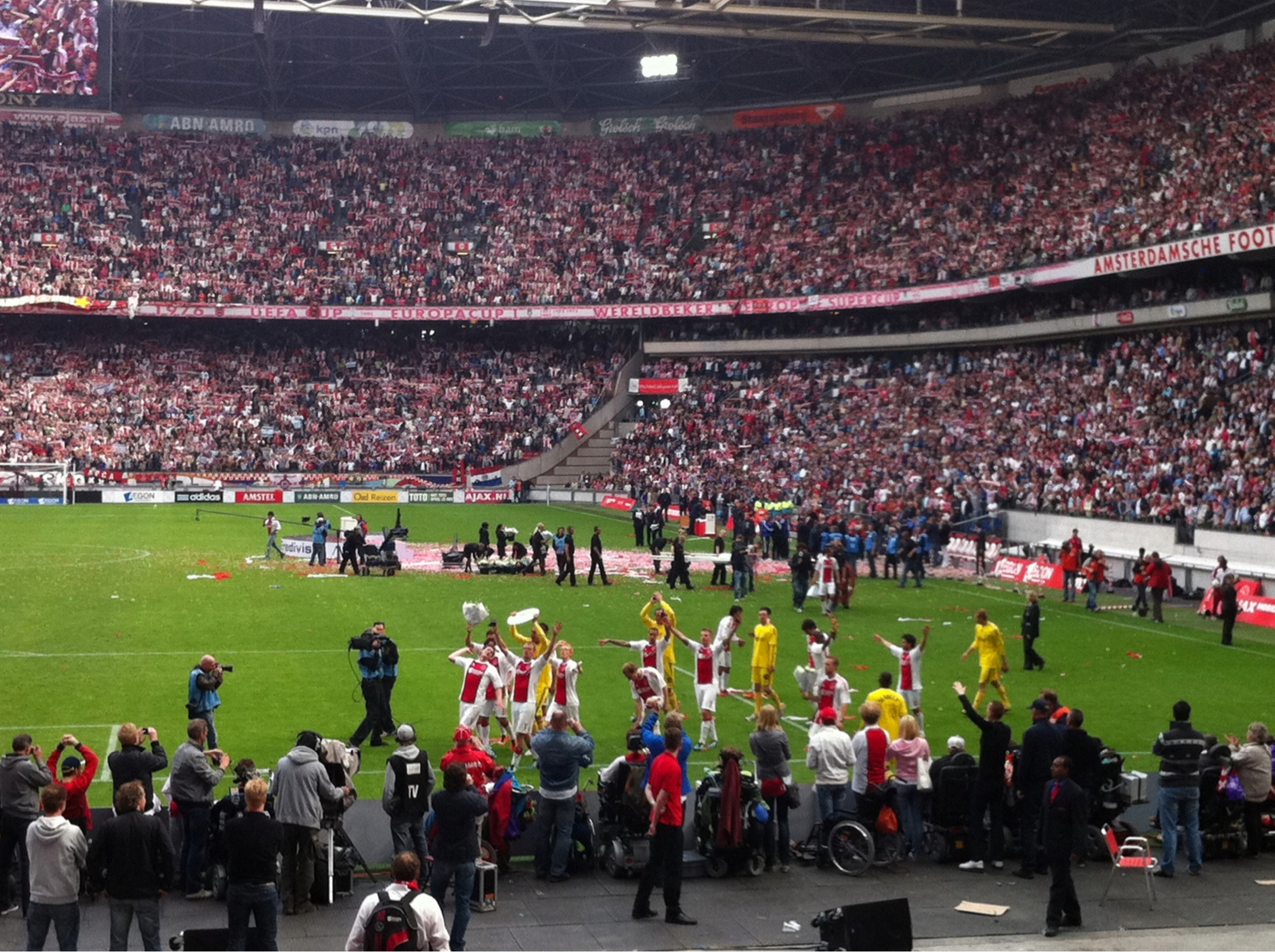 Ajax vs. Twente 3-1, Eredivisie, 15-May-2011, Amsterdam ArenA